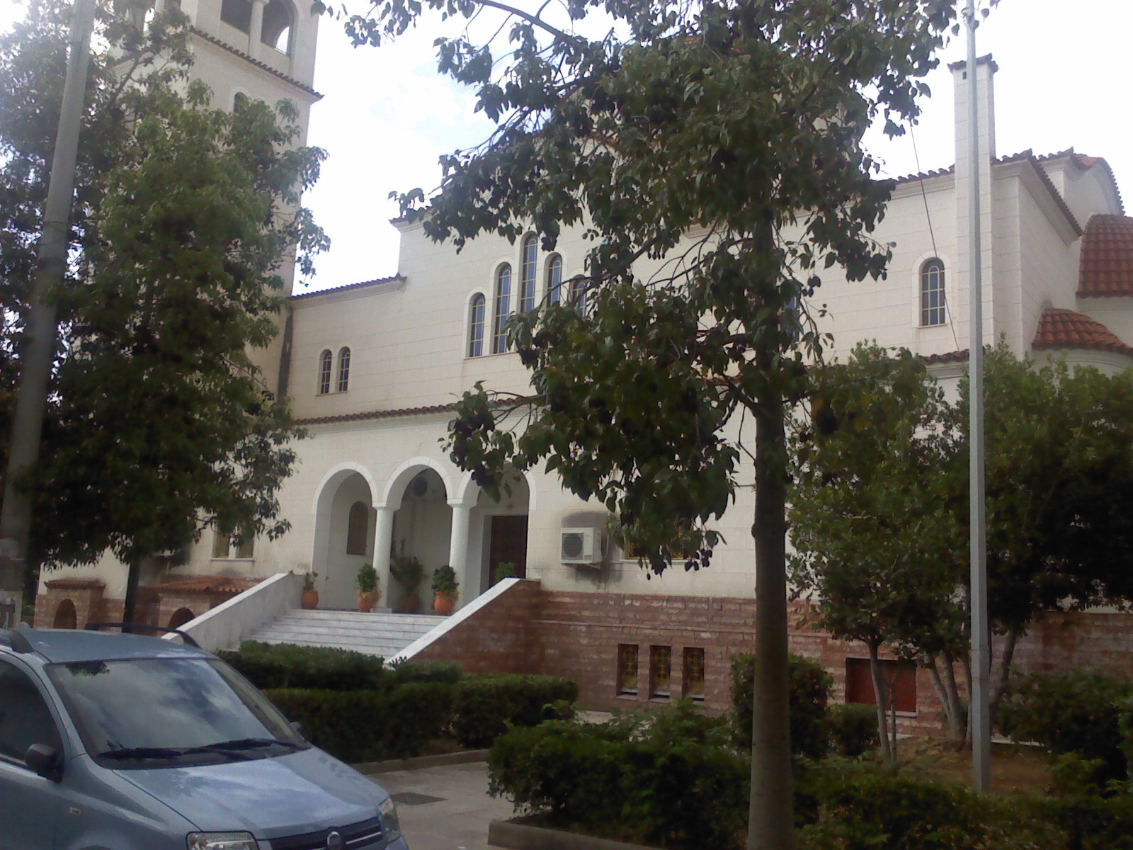 Zoodoxos Pigi in Kalogreza